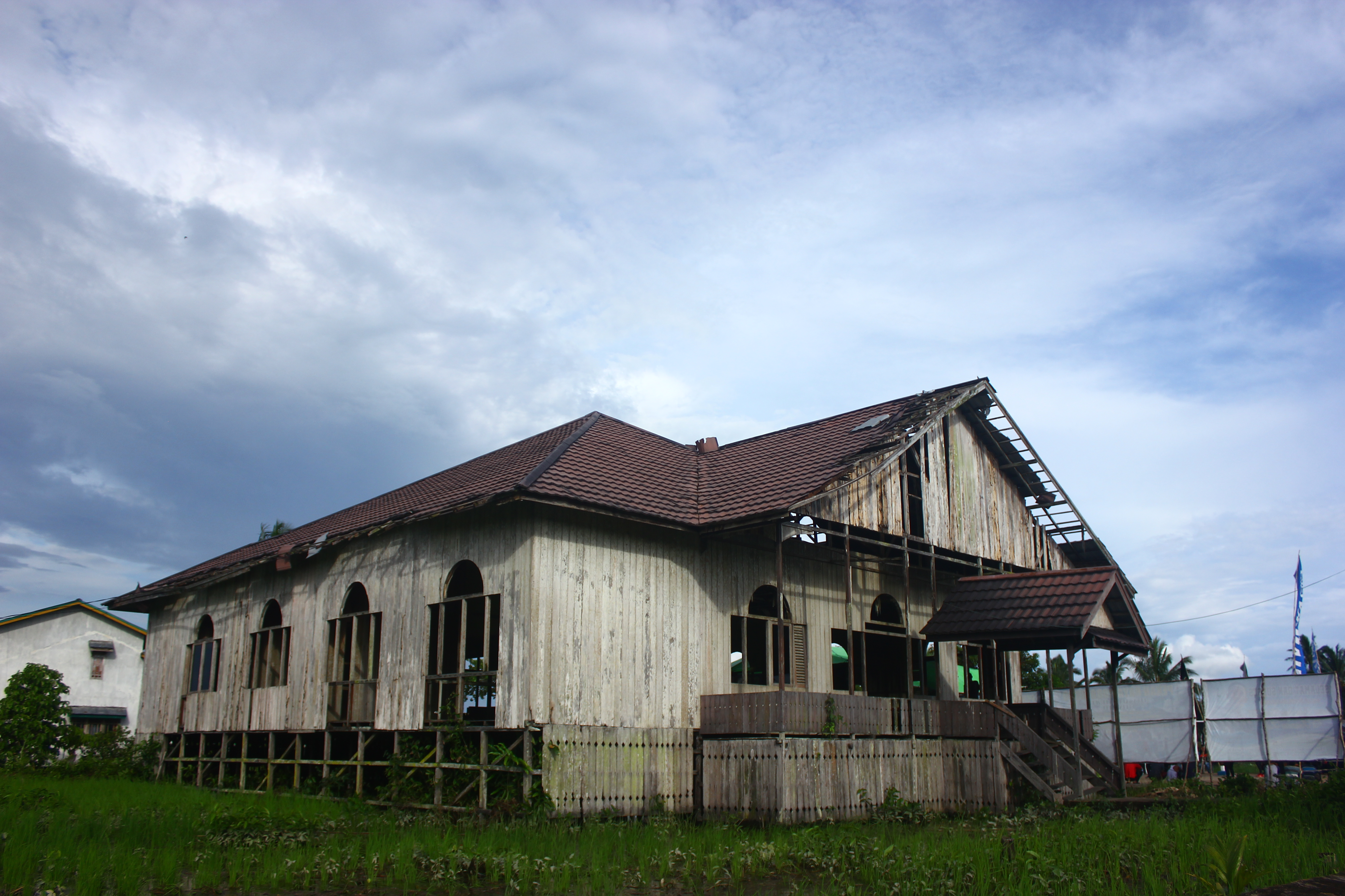 Istana Kerajaan Kubu di Kabupaten Kubu Raya, Kalimantan Barat